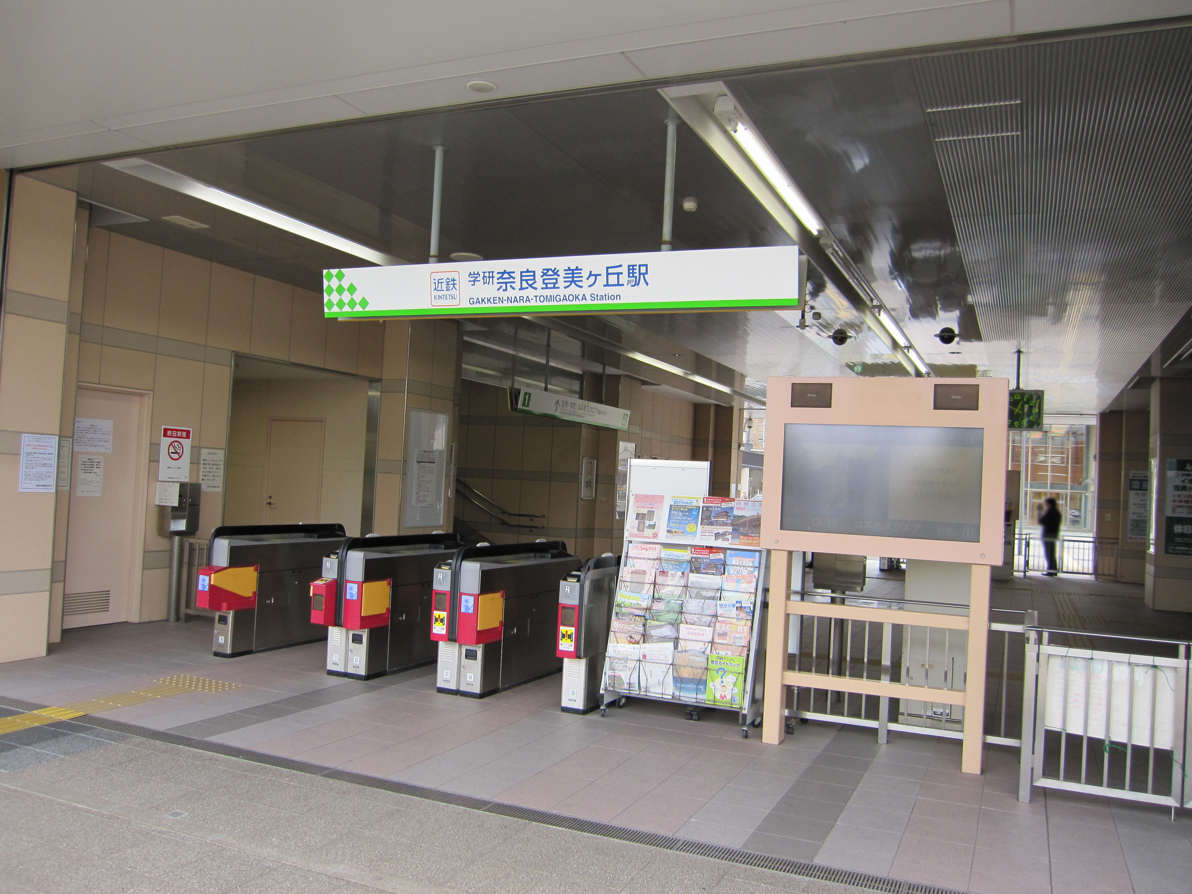 学研奈良登美ヶ丘駅北口改札